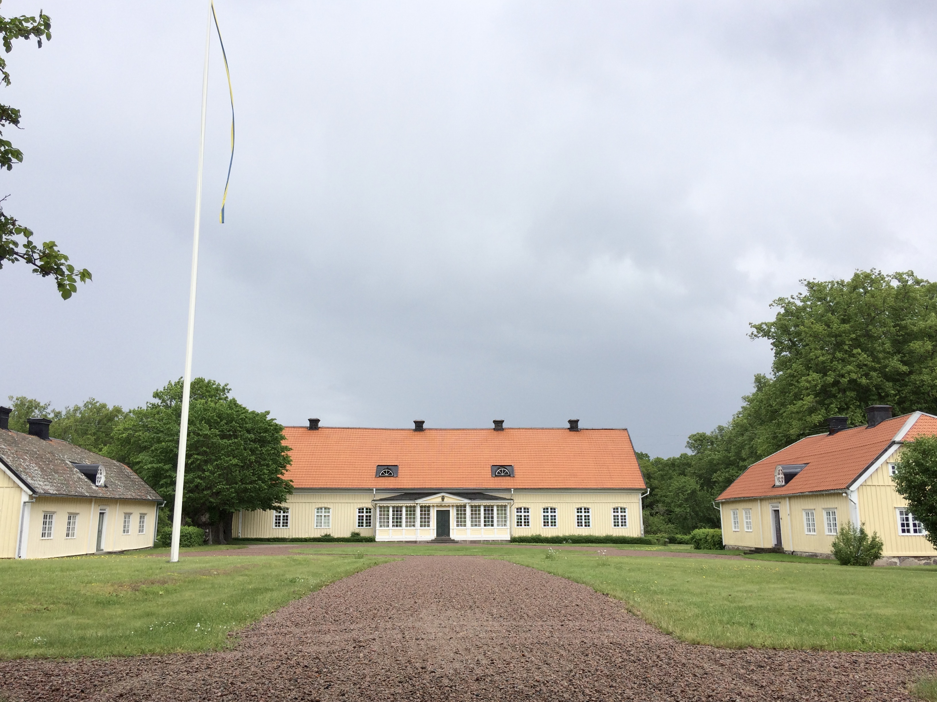 Misterhults gård/säteri i Figeholm, Oskarshamns kommun, Kalmar län, i juni 2017